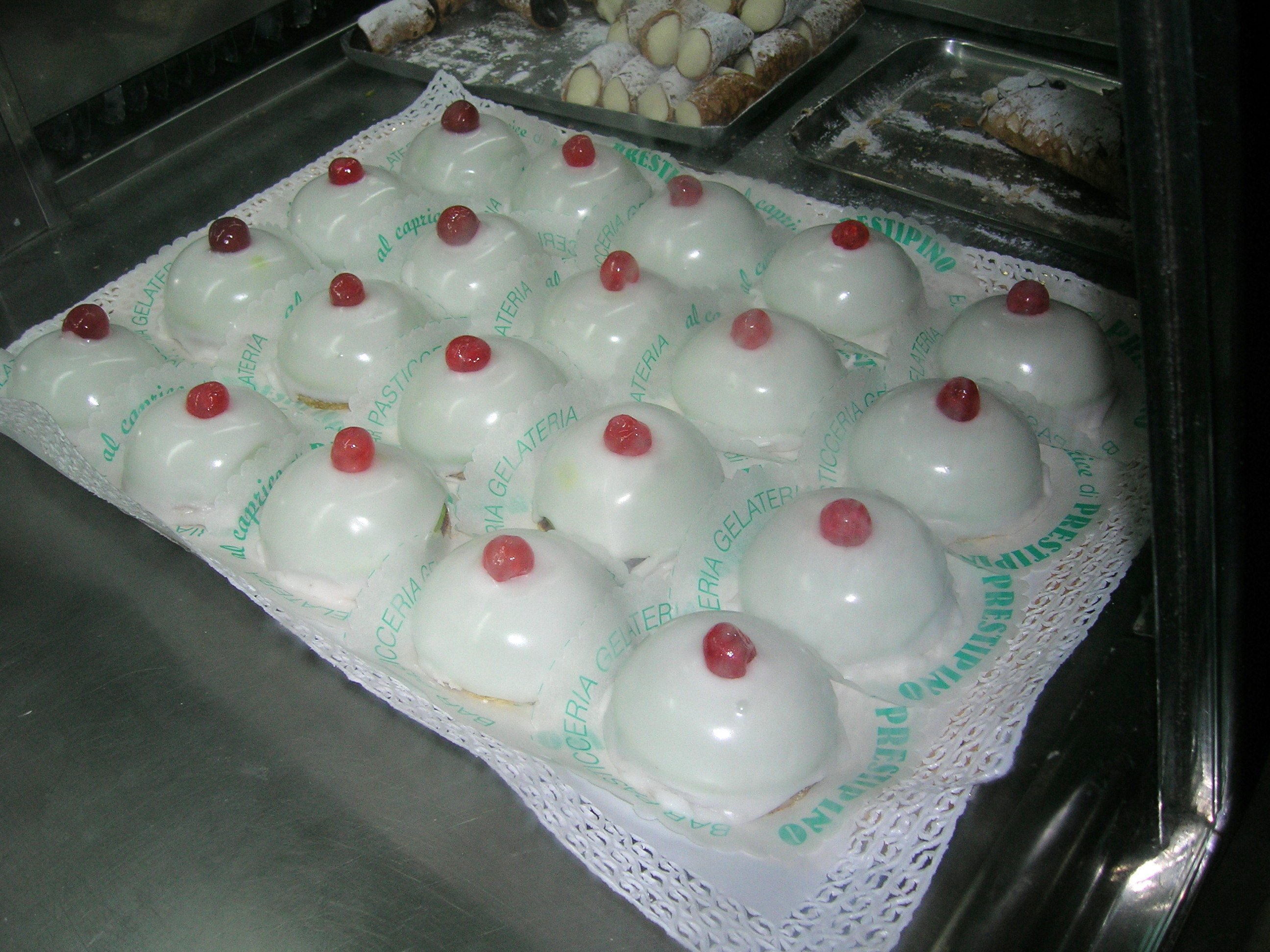 Cassatelle di Sant'Agata dolci caratteristici siciliani